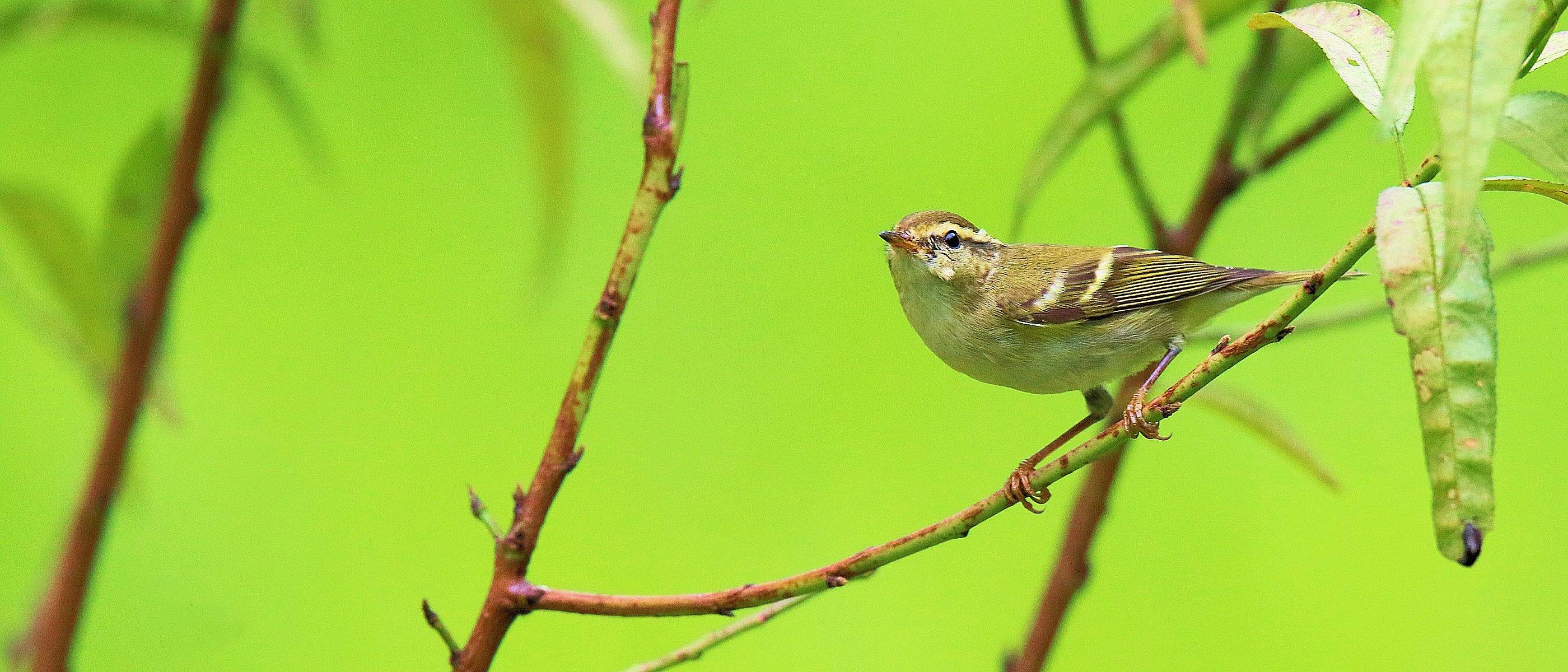 Chích mày lớn chụp tai Ha Nội